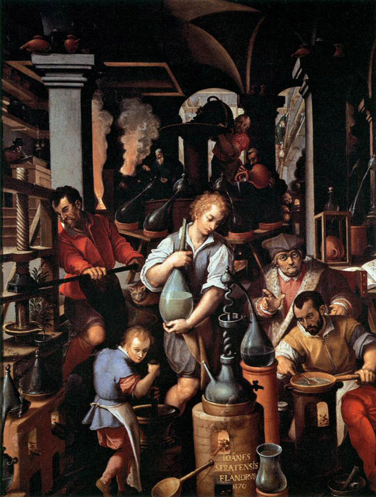 Francesco I nel suo laboratorio alchemico